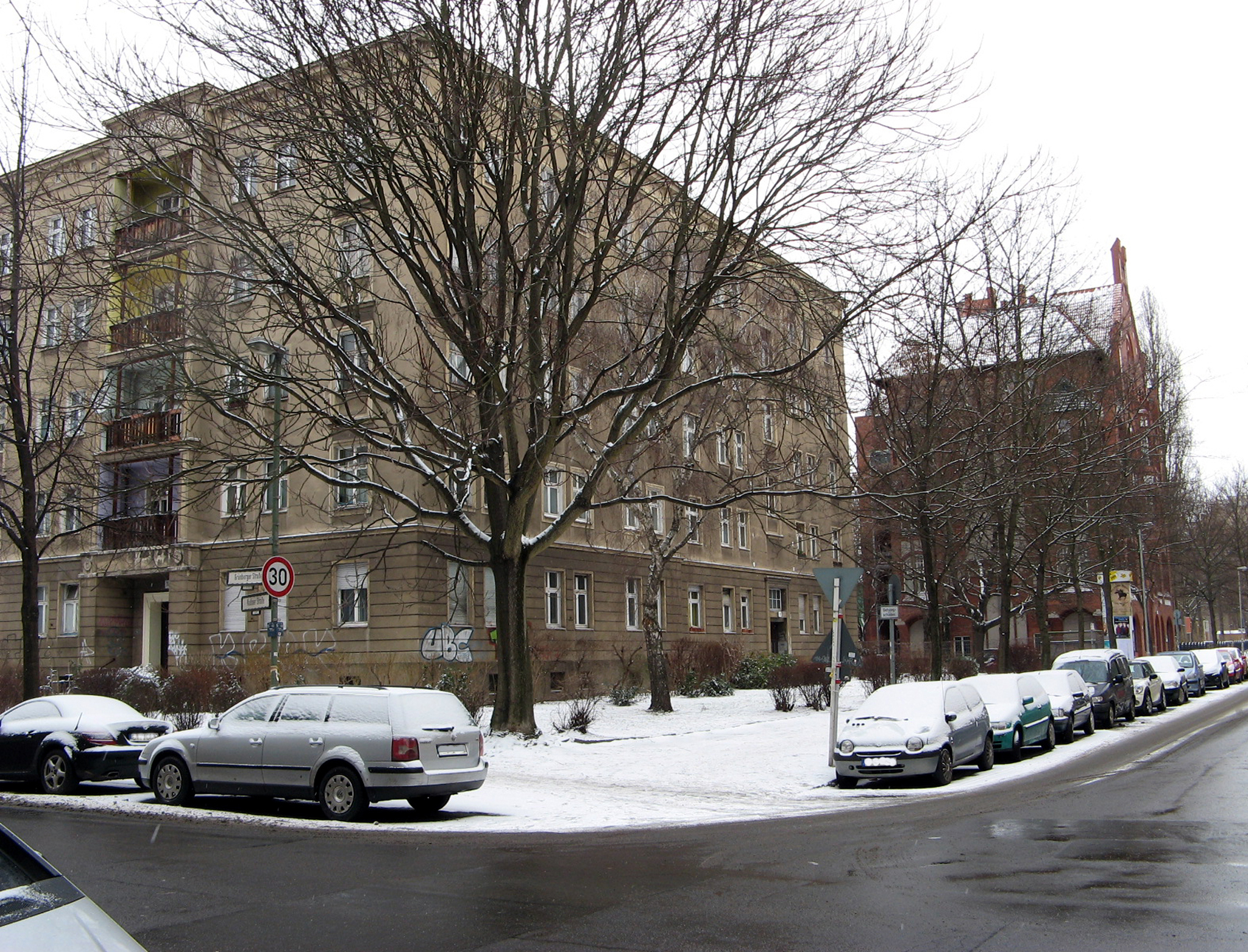 An der Kadiner Ecke Grünberger Straße stand 1907 bis 1949 die neogotische Lazaruskirche aus rotem Backstein, auch "Dom des Ostens" genannt. Sie war 53 Meter lang, 25 Meter breit und hatte einen 66 Meter hohen Turm, den eine achtseitige Kuppel mit Laterne krönte. An ihrer Stelle entstanden in der Grünberger Straße die 1950-er Jahre-Bauten als Abschluss der "Wohnzelle Friedrichshain". Das Bauensemble mit der Kadiner Straße 12, steht unter Denkmalschutz.